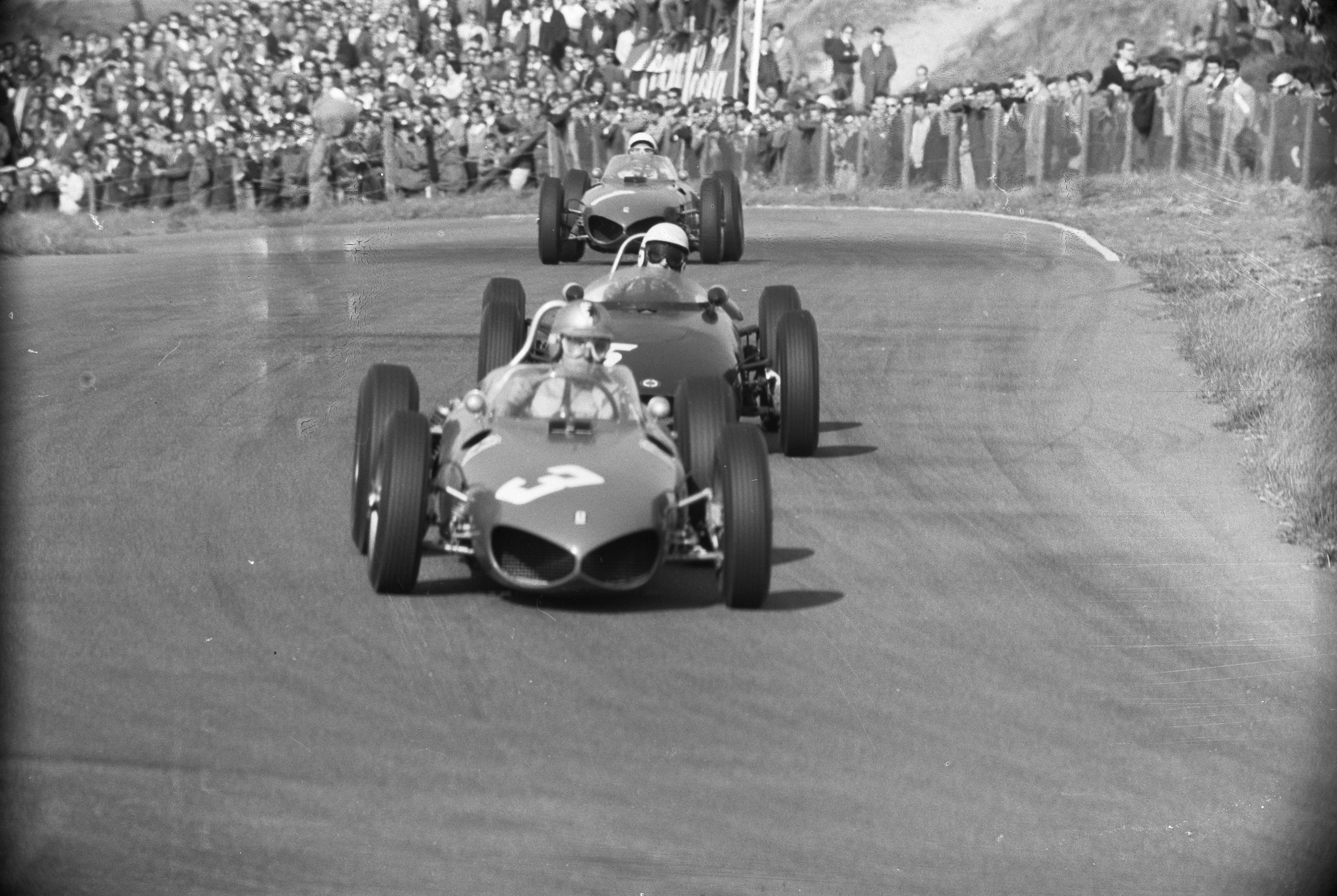 Grand Prix te Zandvoort. Von Trips , Jim Clark , Phil Hill.